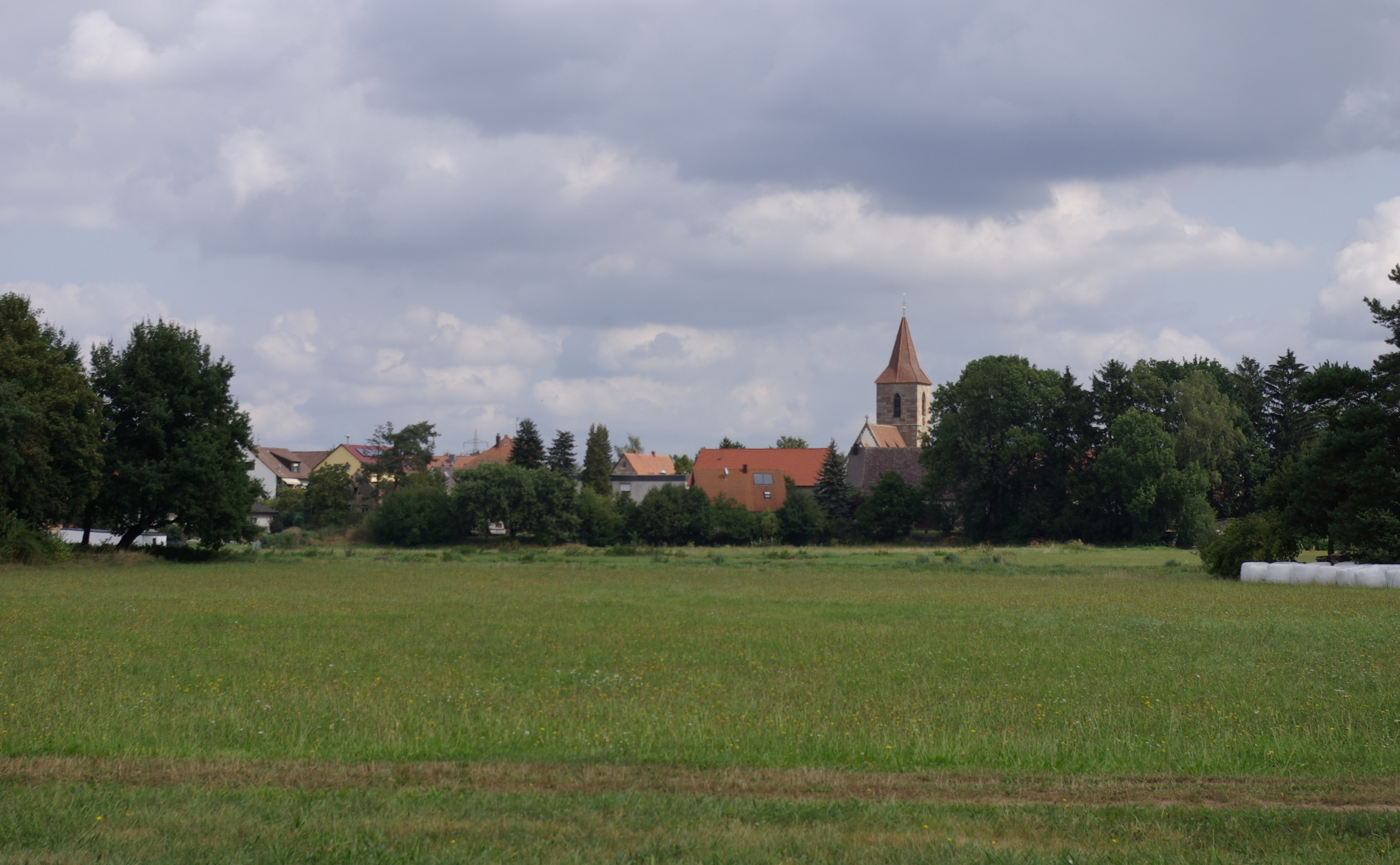 Blick vom Wiesengrund auf den nördlichen Dorfkern von Erlangen-Eltersdorf